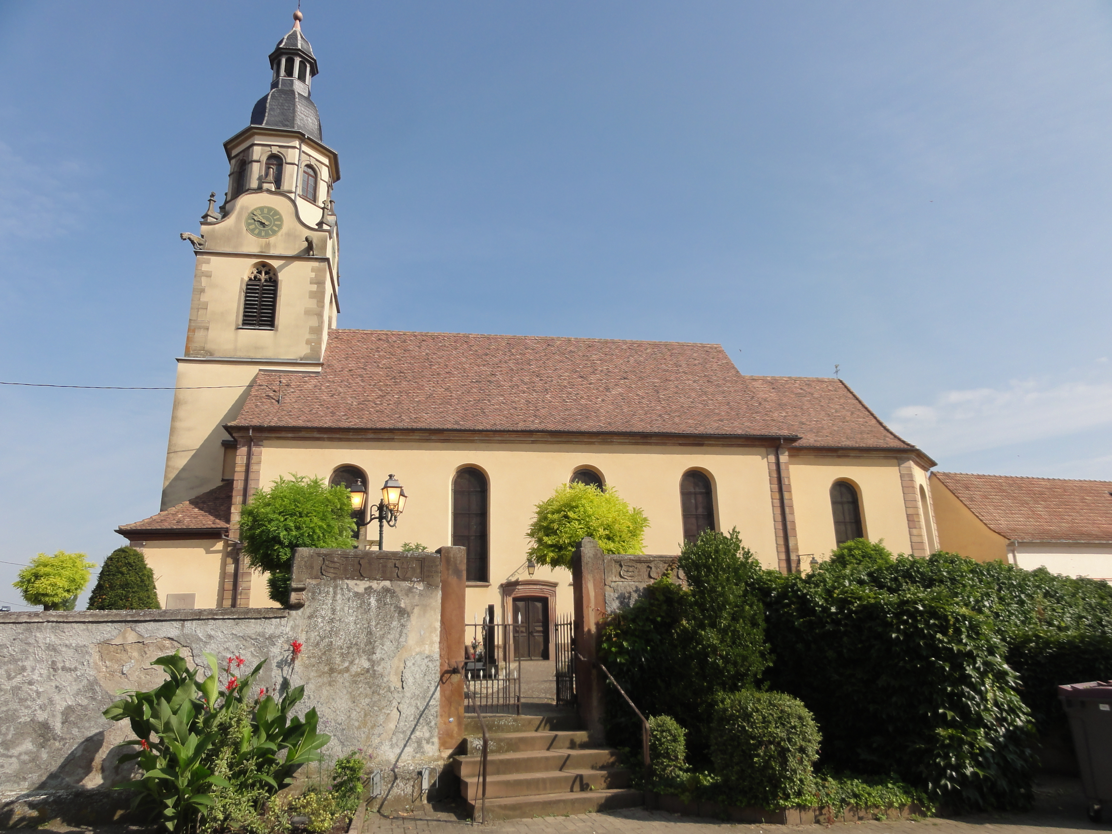 Alsace, Bas-Rhin, Osthouse, Église Saint-Barthélémy (XVe-XVIIIe) (PA00084879, IA00023400). Porte du cimetière (1559): .